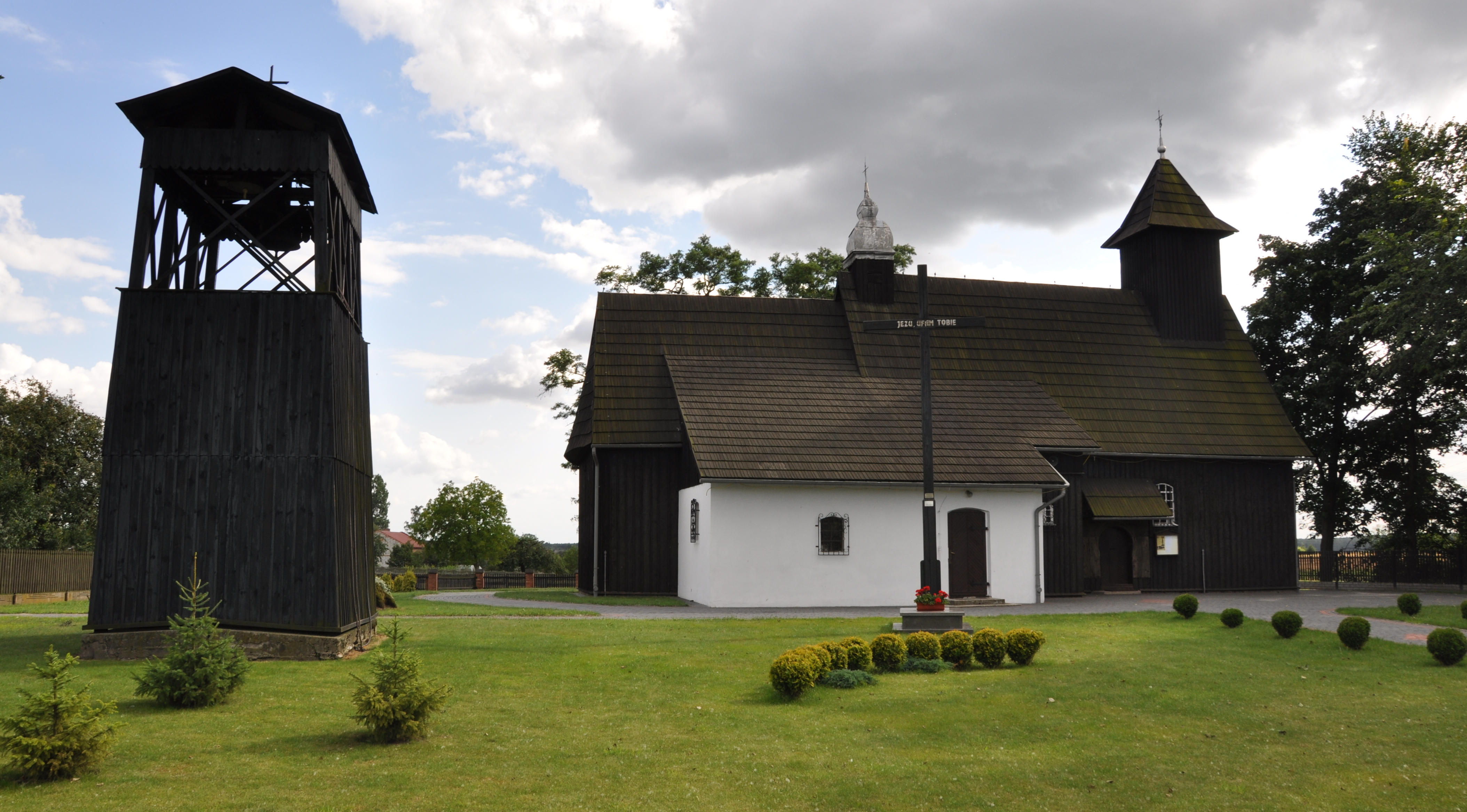 Kościół par. pw. św. Leonarda w Wierzbiu - widok z przodu. Widoczna również dzwonnica.